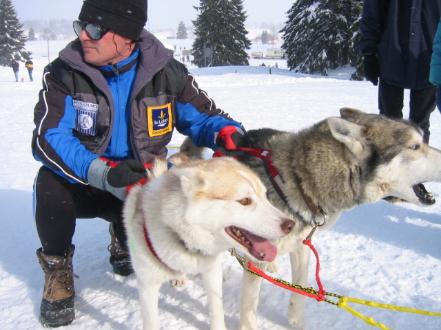 Course de Husky 3